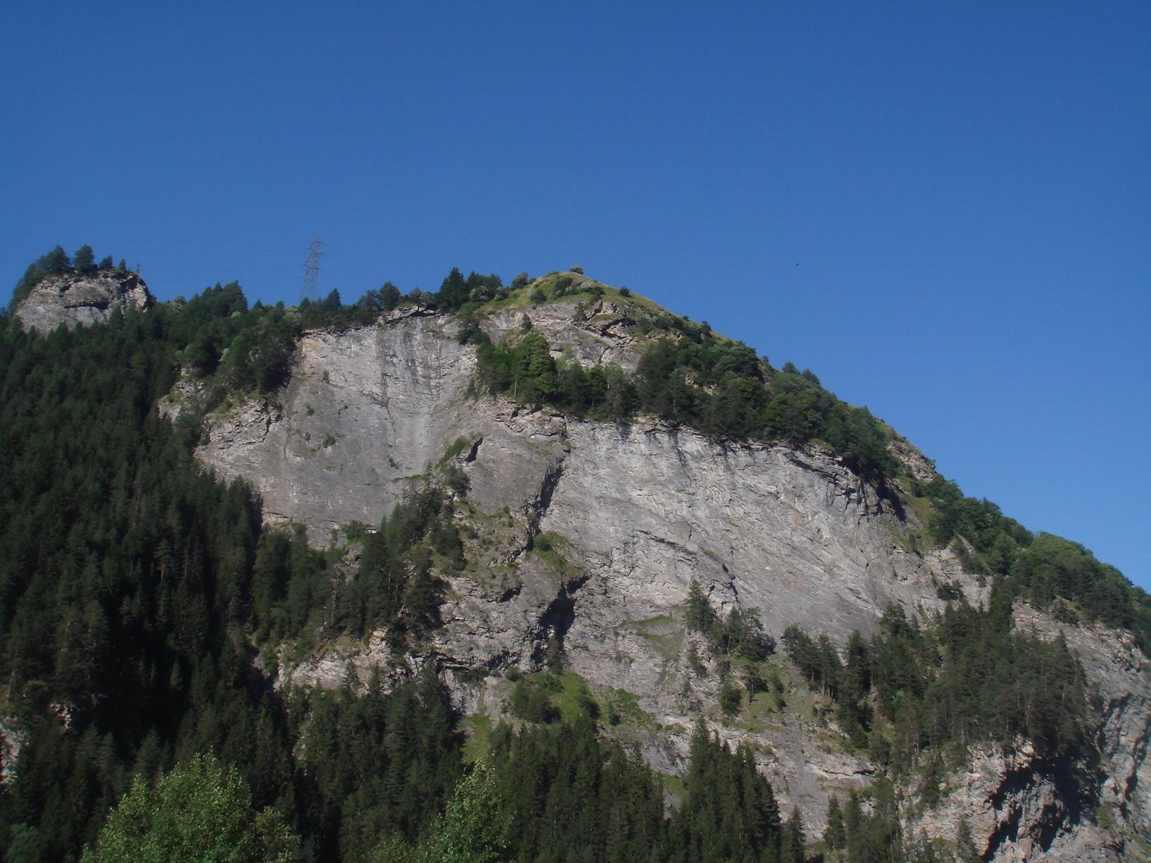 SchynschluchtRumantsch: Meir